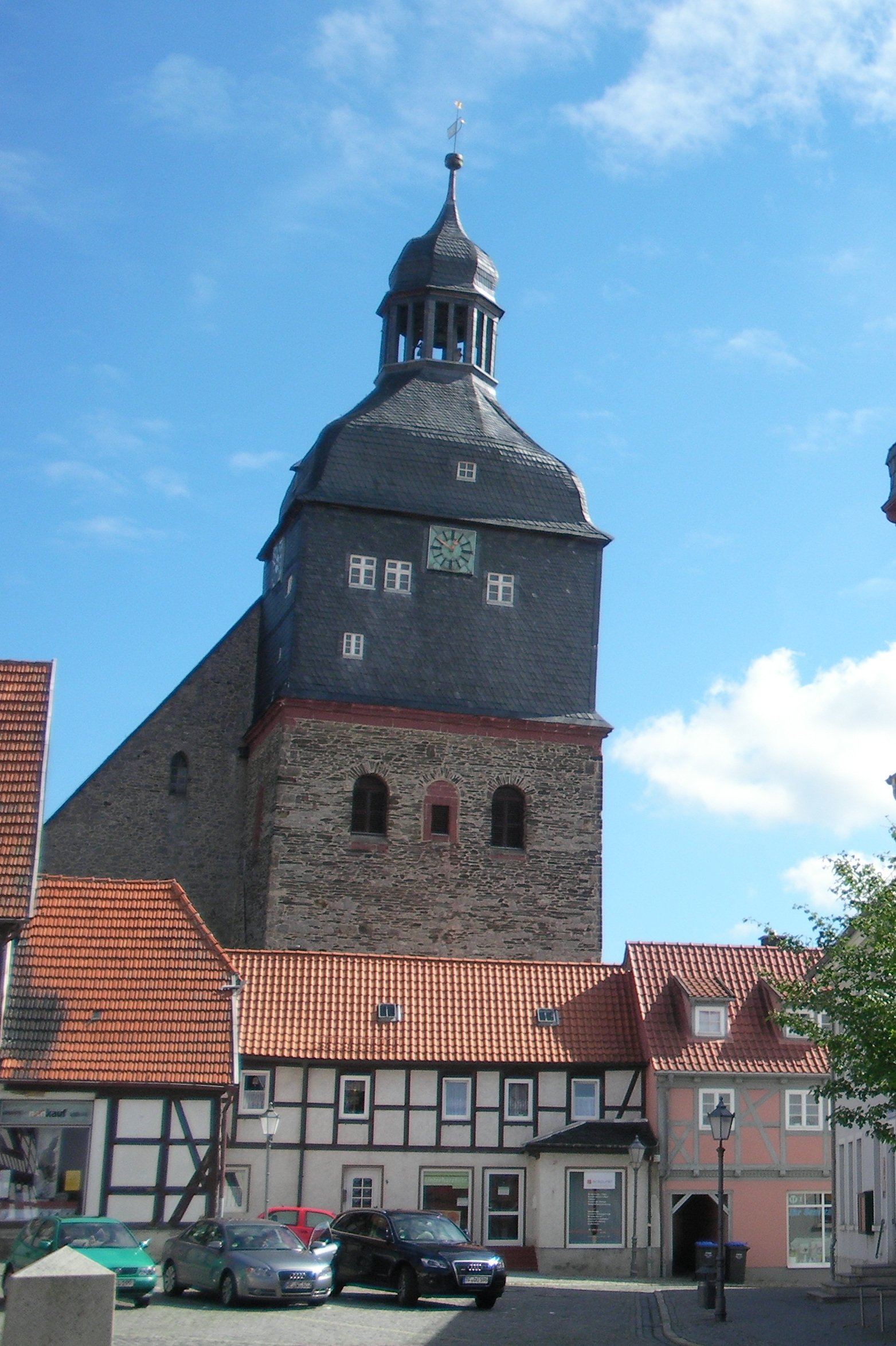 Harzgerode, Rathaus und St.-Marien-Kirche